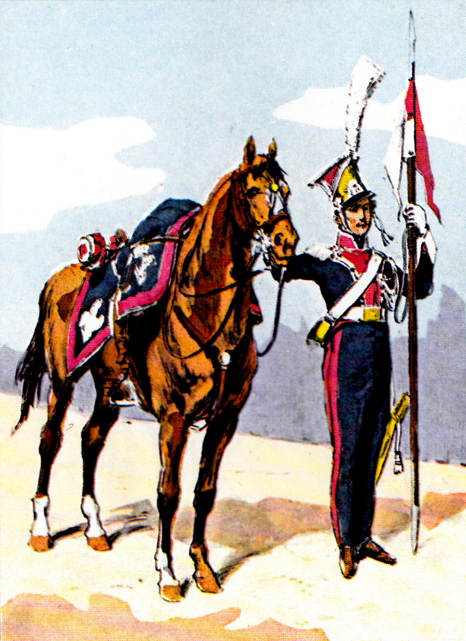 Lancier polonais du 1er régiment de la Garde impériale en grande tenue.